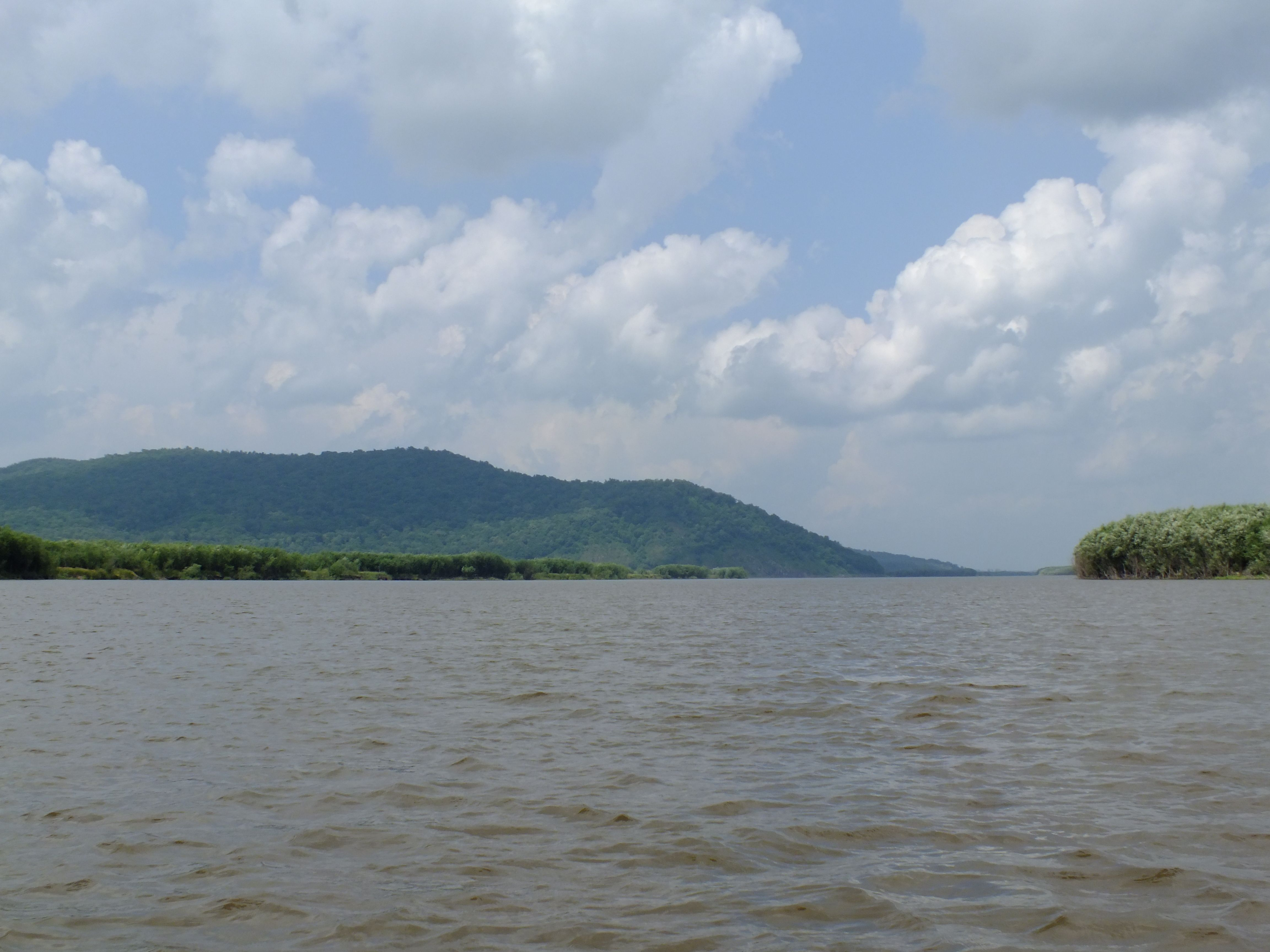 Протока Серебряная у села Ачан Хабаровский край